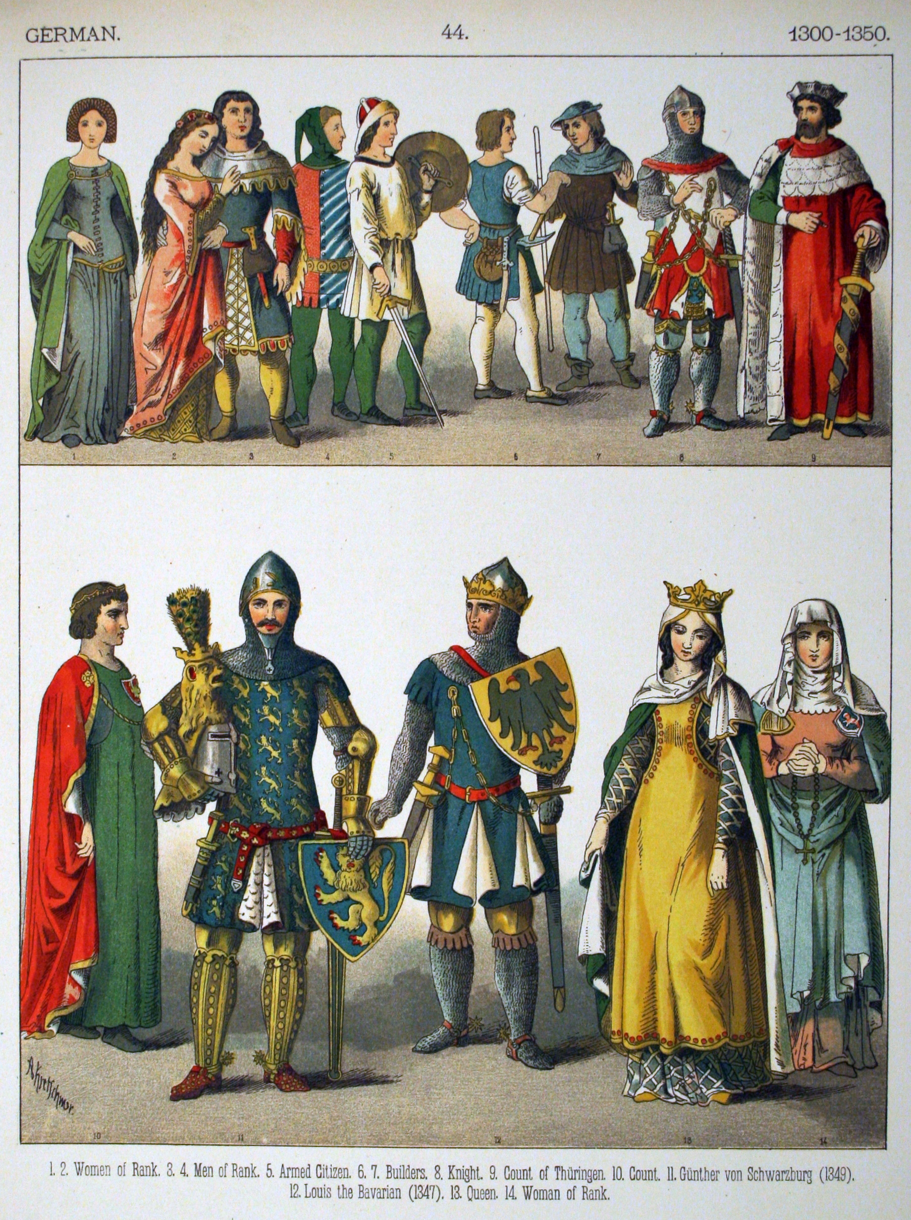 1300-1350, German